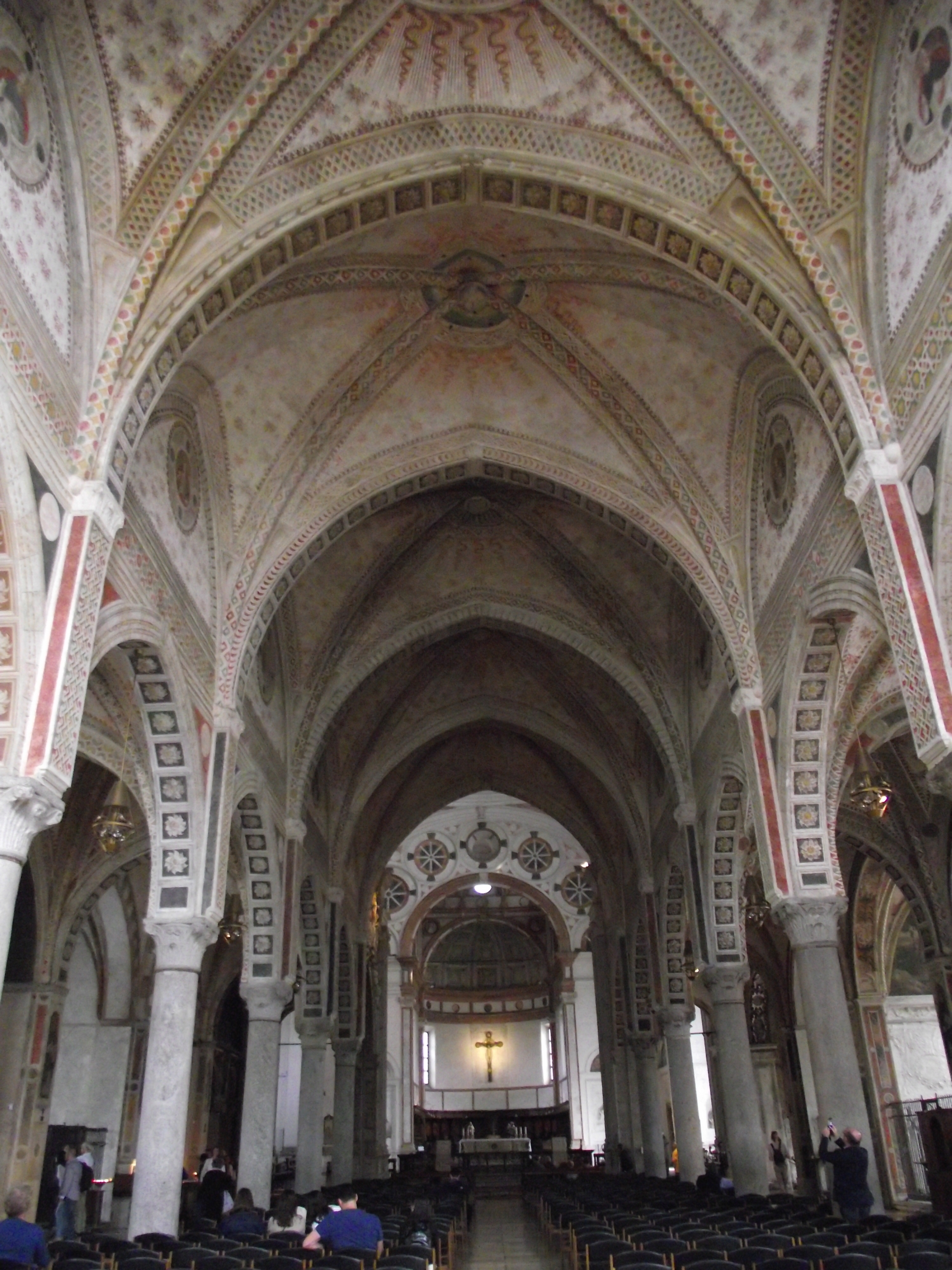 Interno